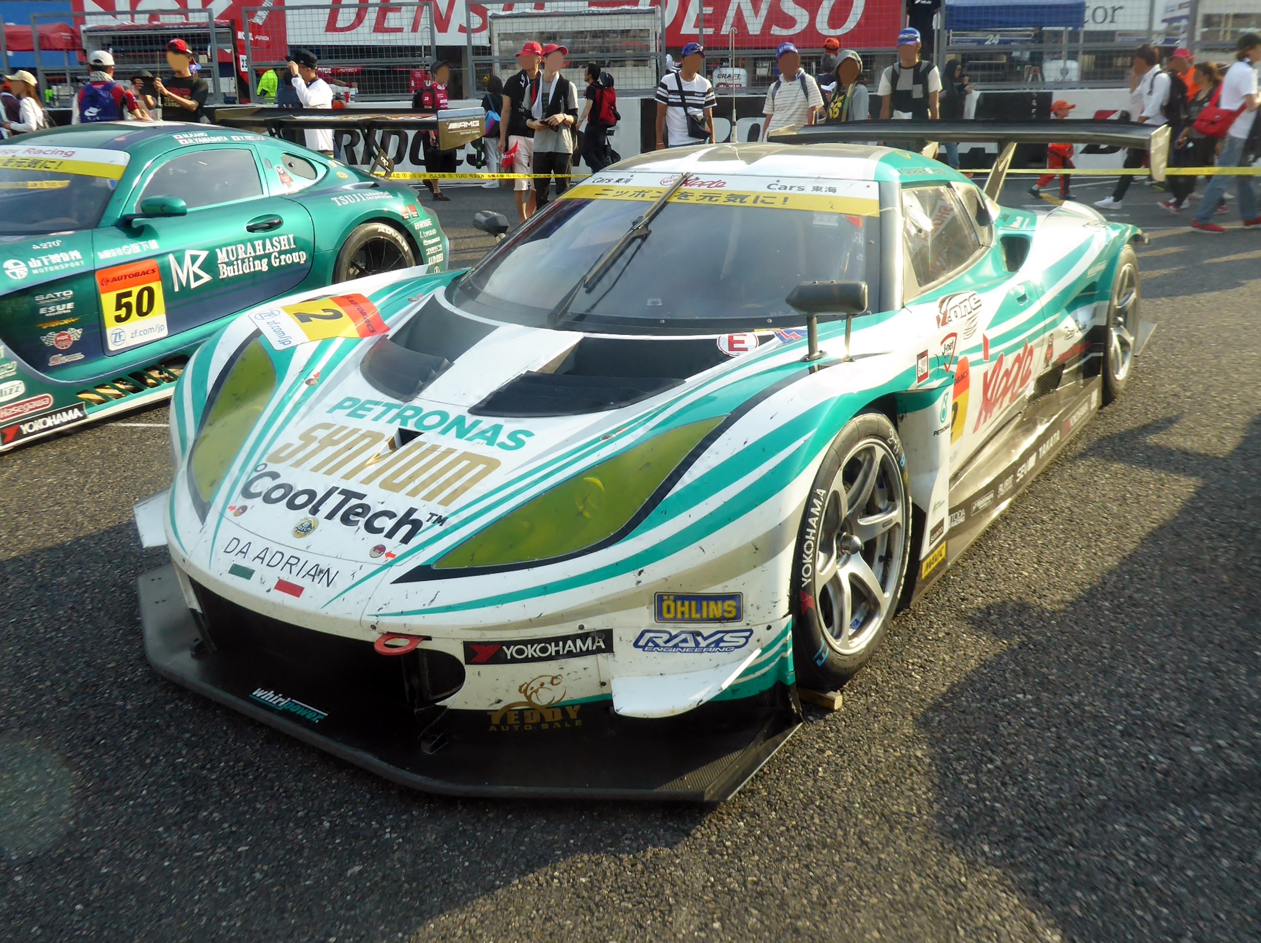 2019年鈴鹿GT300㎞終了後の2号車シンティアム・アップル・ロータスを撮影。